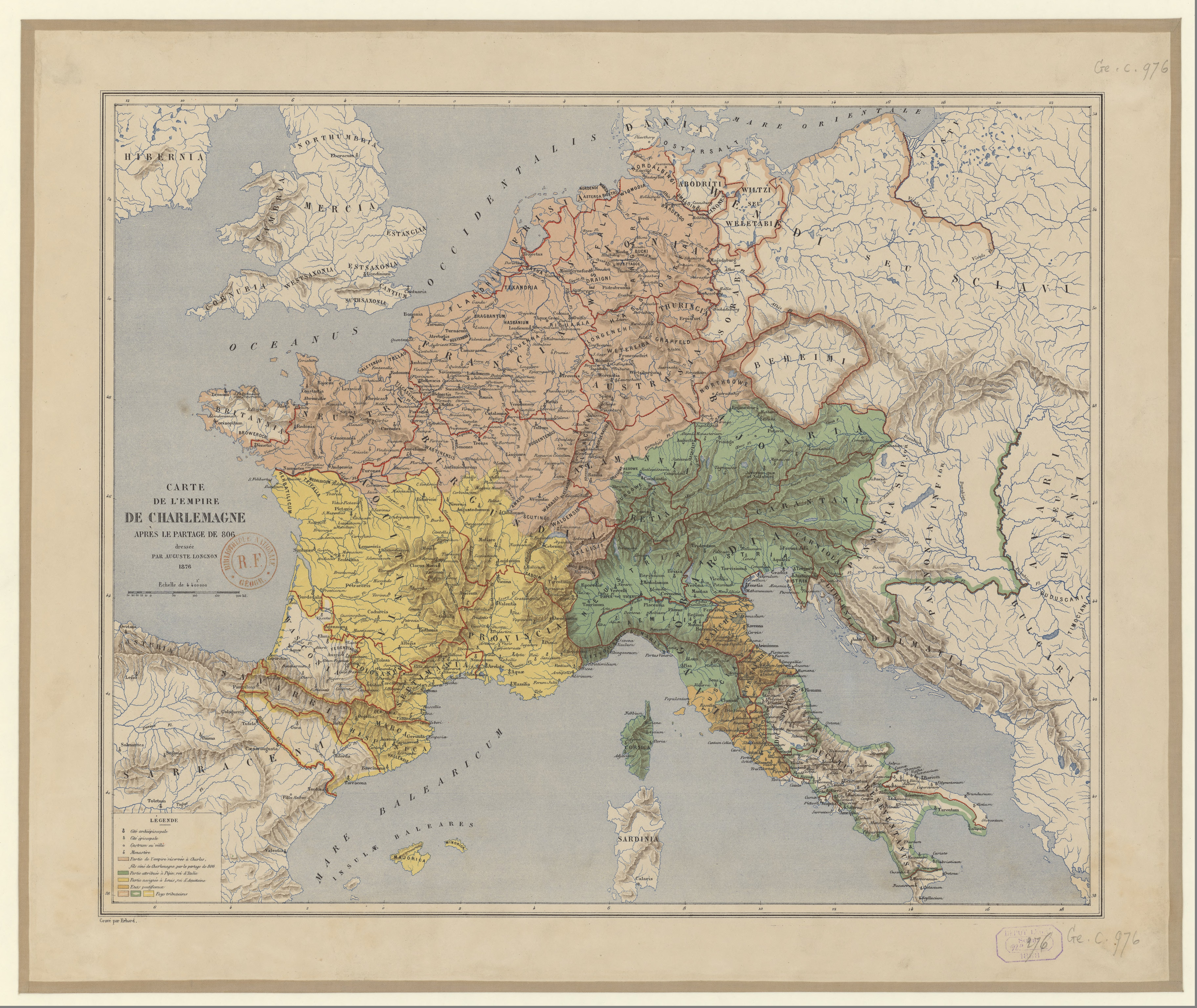 Carte de l'empire de Charlemagne après le partage de 806 dressée par Auguste Longnon, 1876.